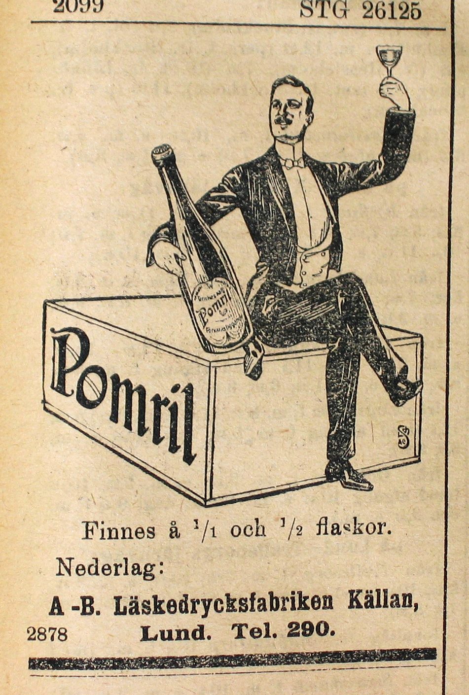 Annons för läskedrycken Pomril publicerad i Lunds Dagblad i juli 1908.